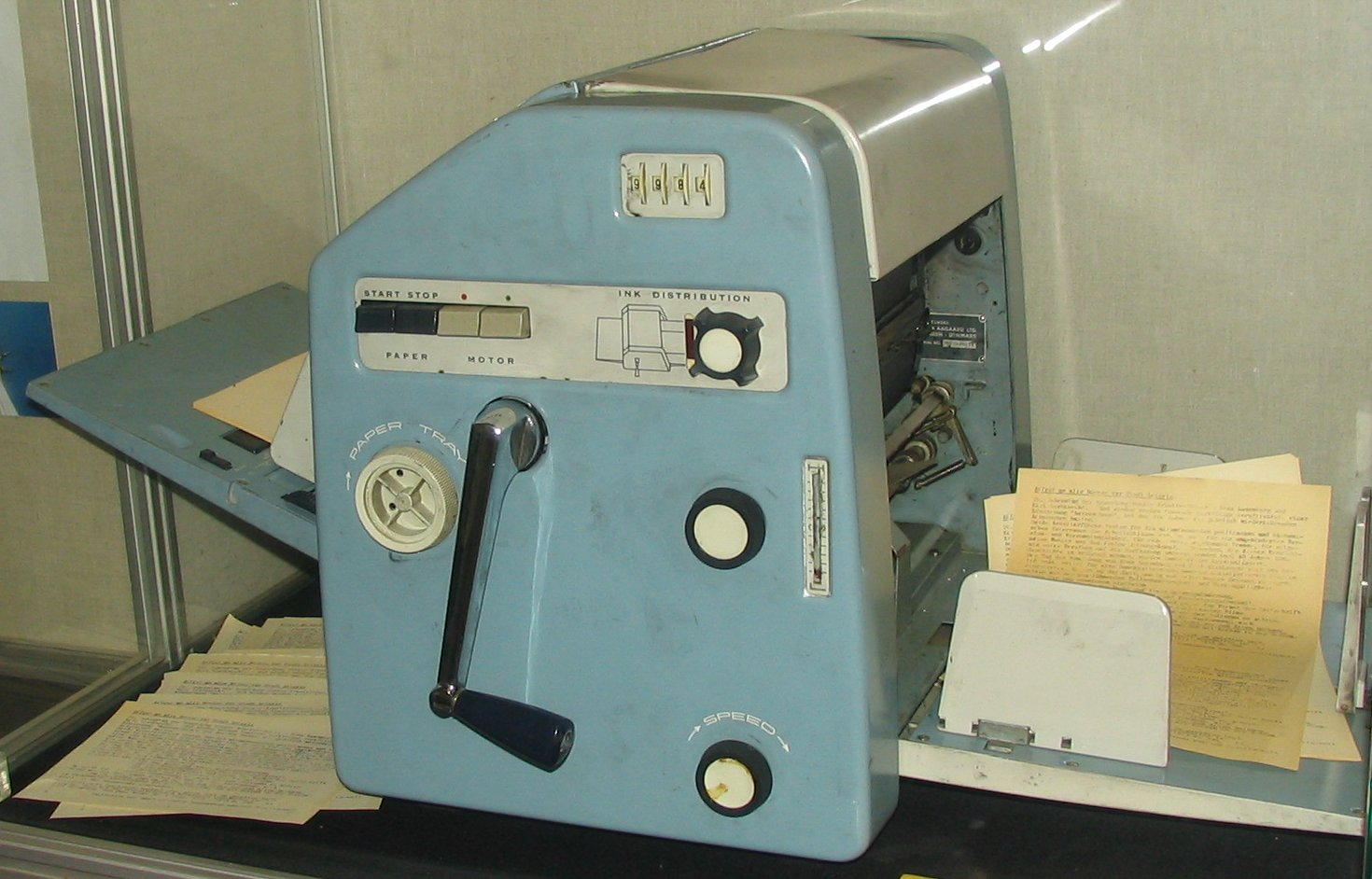 Hektographiergerät aus der DDR. Jegliches Drucken in der DDR bedurfte einer staatlichen Genehmigung. Nur kirchliche Gemeinden durften diese Geräte für innerdienstliche Zwecke benutzen. Das benötigte Material, wie Matrizen, Farben etc. musste aus dem "Westen" besorgt werden. 1989 existierte in Leipzig ein illegal eingeführtes Gerät mit dem im Januar ein Flugblatt mit einer Auflage von 10.000 produziert wurde.